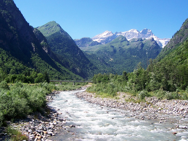 Riva Valdobbia - Fiume Sesia